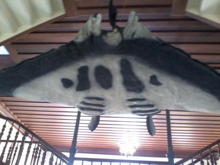 Raia encontrada na entrada do Museu de Pesca da cidade de Santos/ SP - Brasil